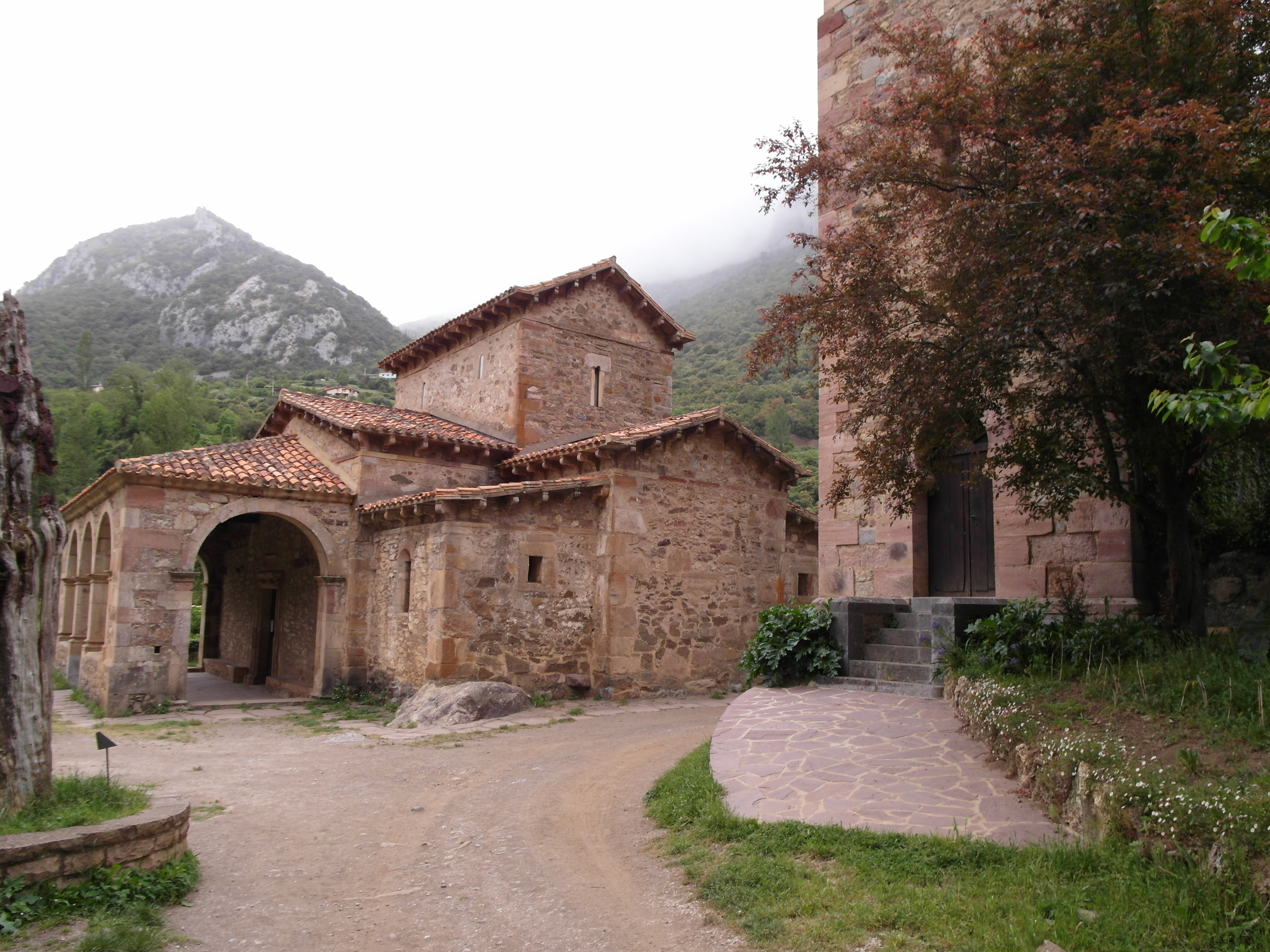 Iglesia de Santa María (Lebeña).